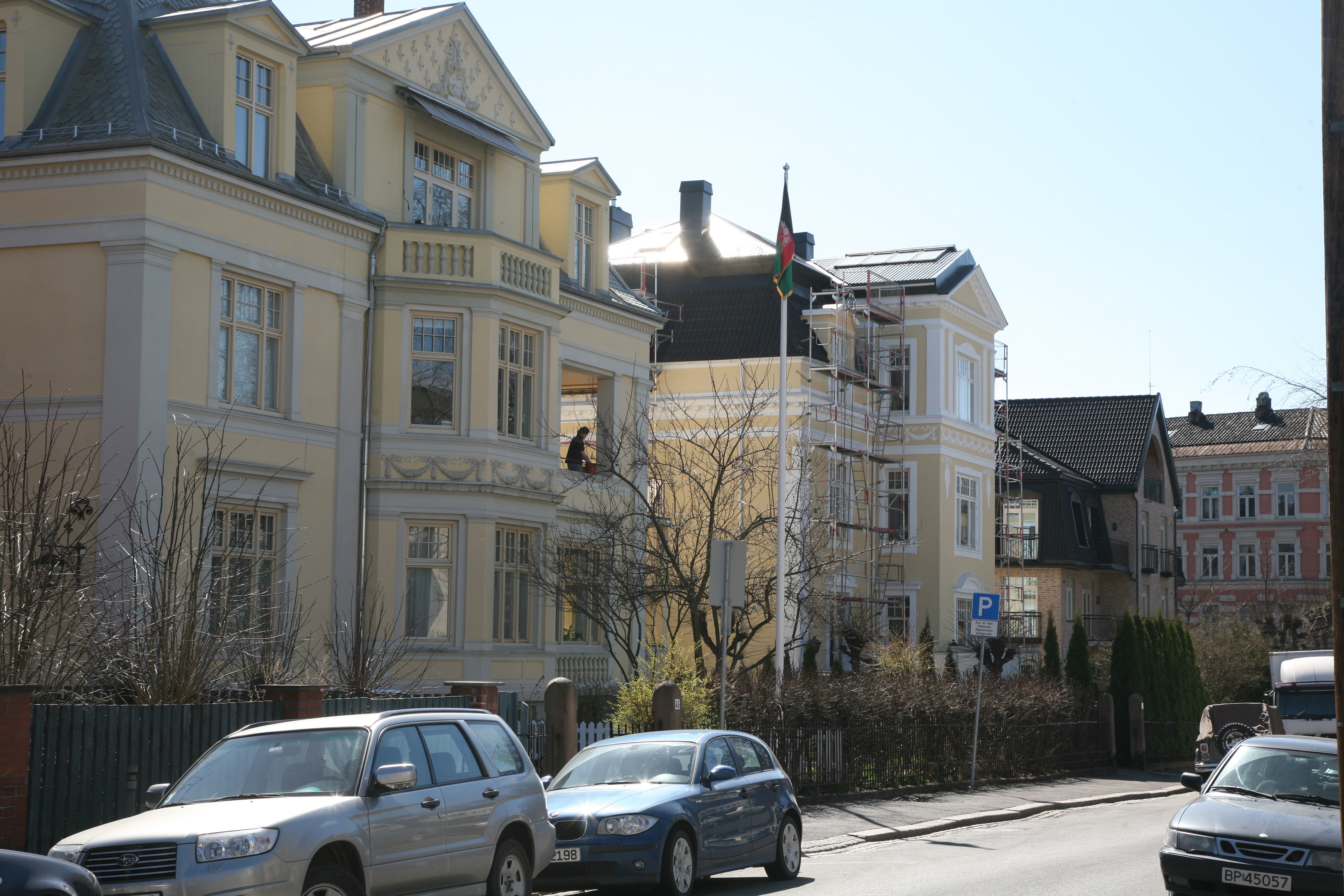 From Eckersbergs gate in Oslo, Norway